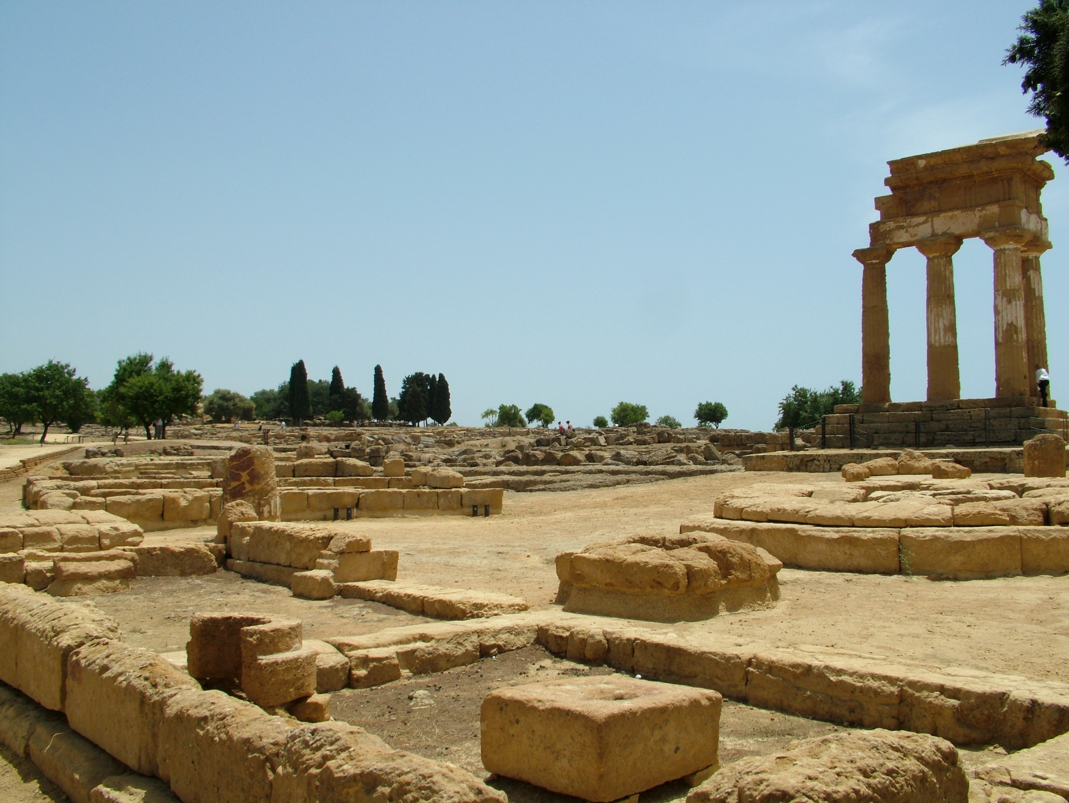 Agrigento, Sizilien, Heiligtum der chthonischen Gottheiten mit Säulen des Dioskurentempels